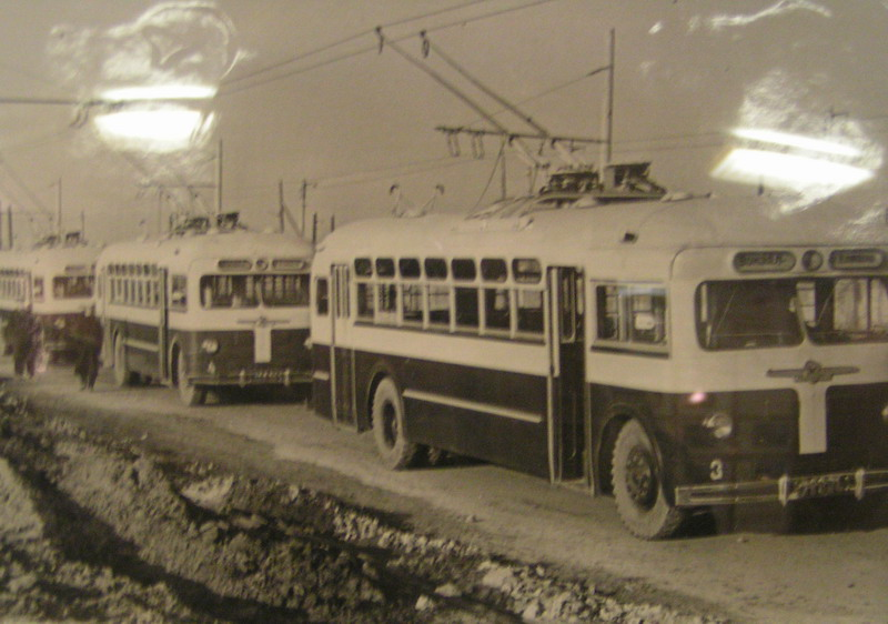 первые троллейбусы Воронежа